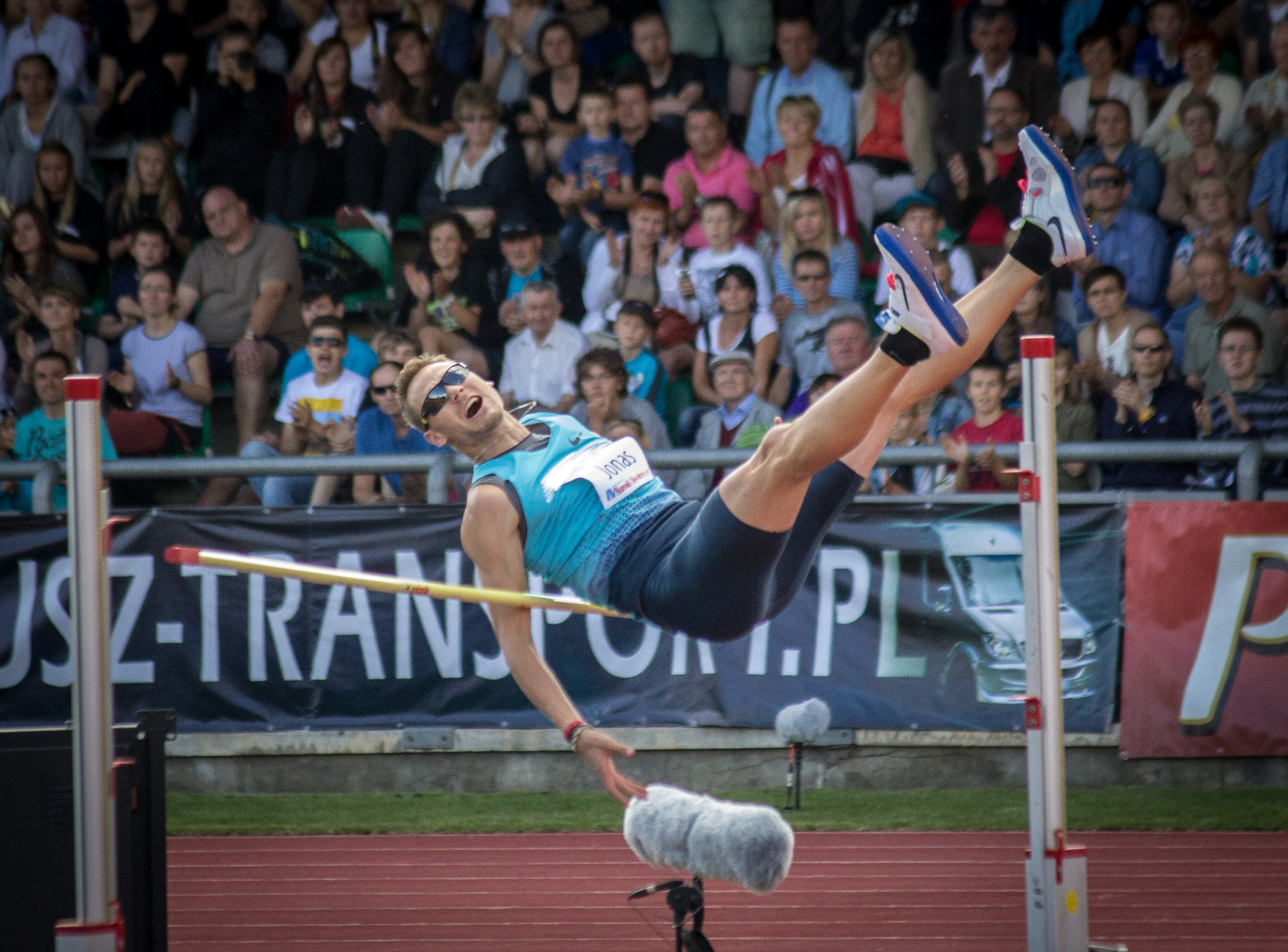 Memoriał Kamili Skolimowskiej w Warszawie, 2013-08-25